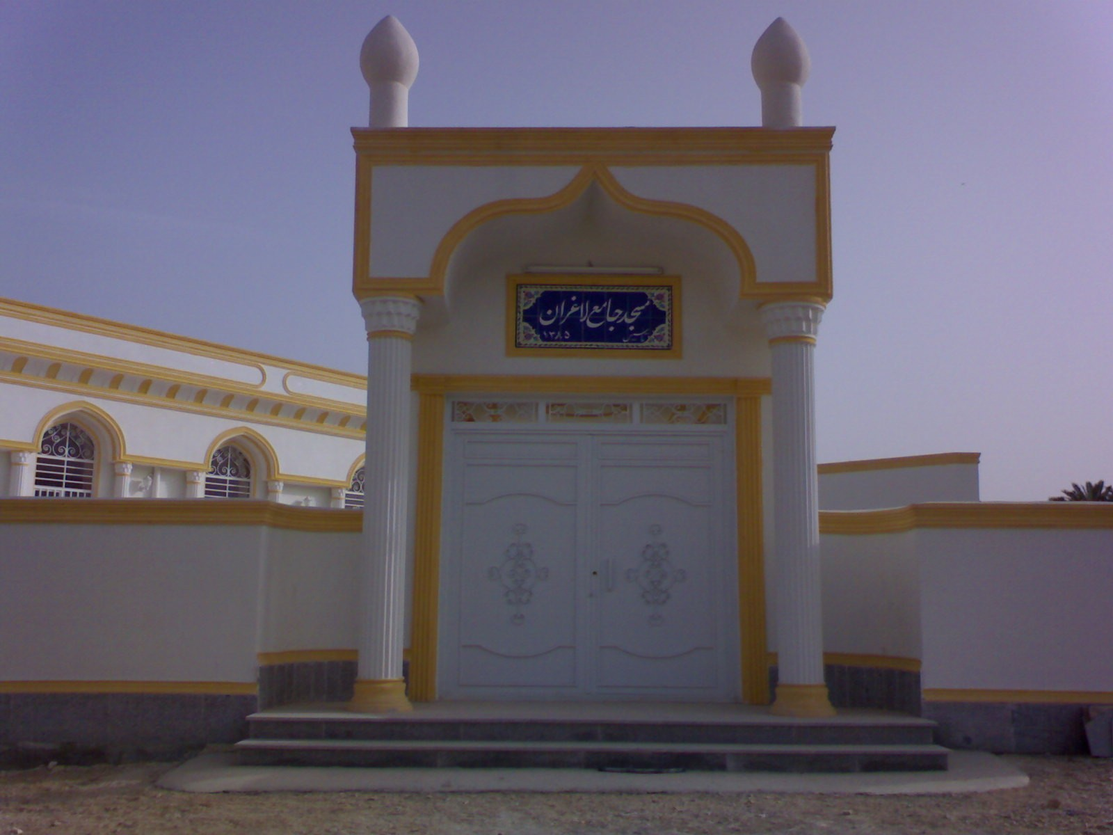 مسجد جامع لاغران